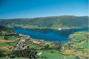 Ølen